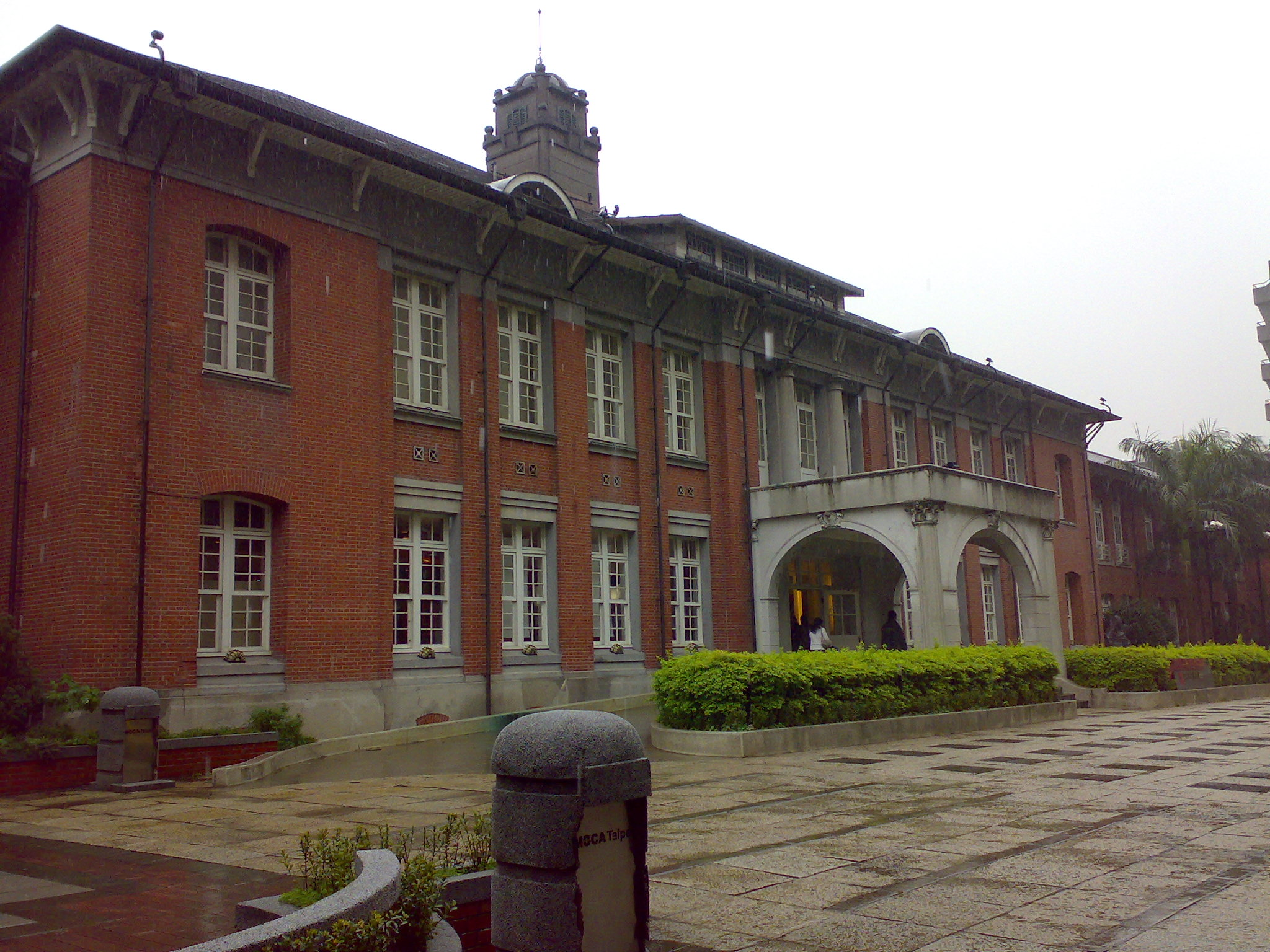 臺北當代藝術館（舊臺北市政府大樓）。